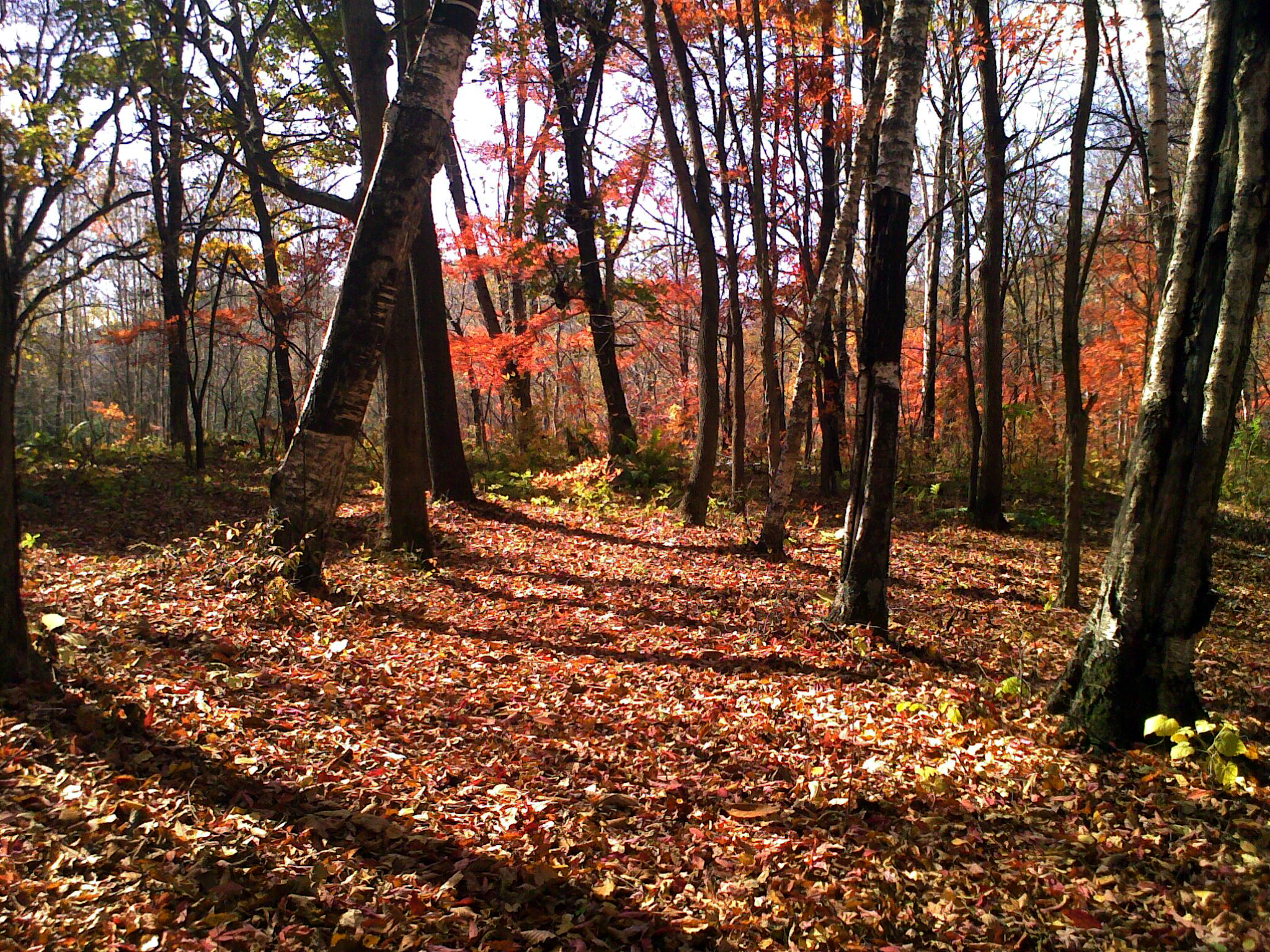 秋意浓--蛟河红叶谷